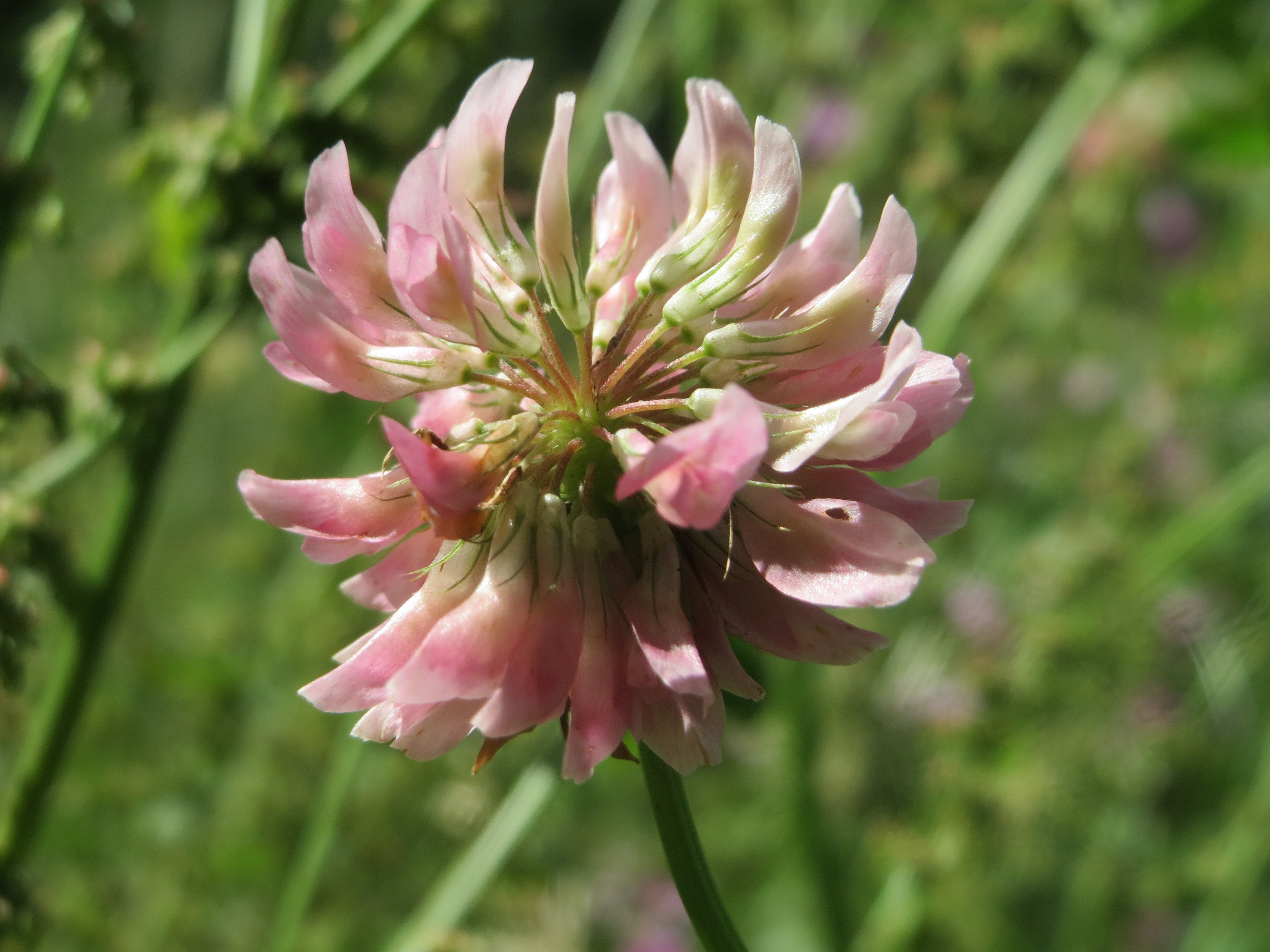 Schweden-Klee (Trifolium hybridum) an der Saar in Saarbrücken